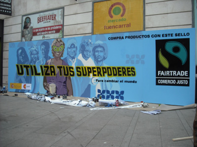 Mural de Comercio Justo. "Utiliza tus superpoderes" : Tod@s tenemos mucho poder como consumidoras y consumidores. La certificación Fairtrade-Comercio Justo te da la posiblidad de usarlo, ya que identifica los productos de Comercio Justo.